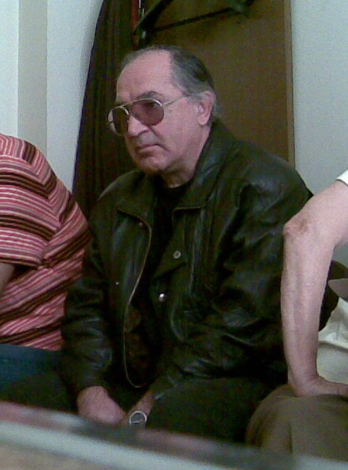 Слика Маријана Бенеша коју сам данас (29.09.2009.) усликао.